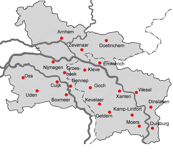 own drawing